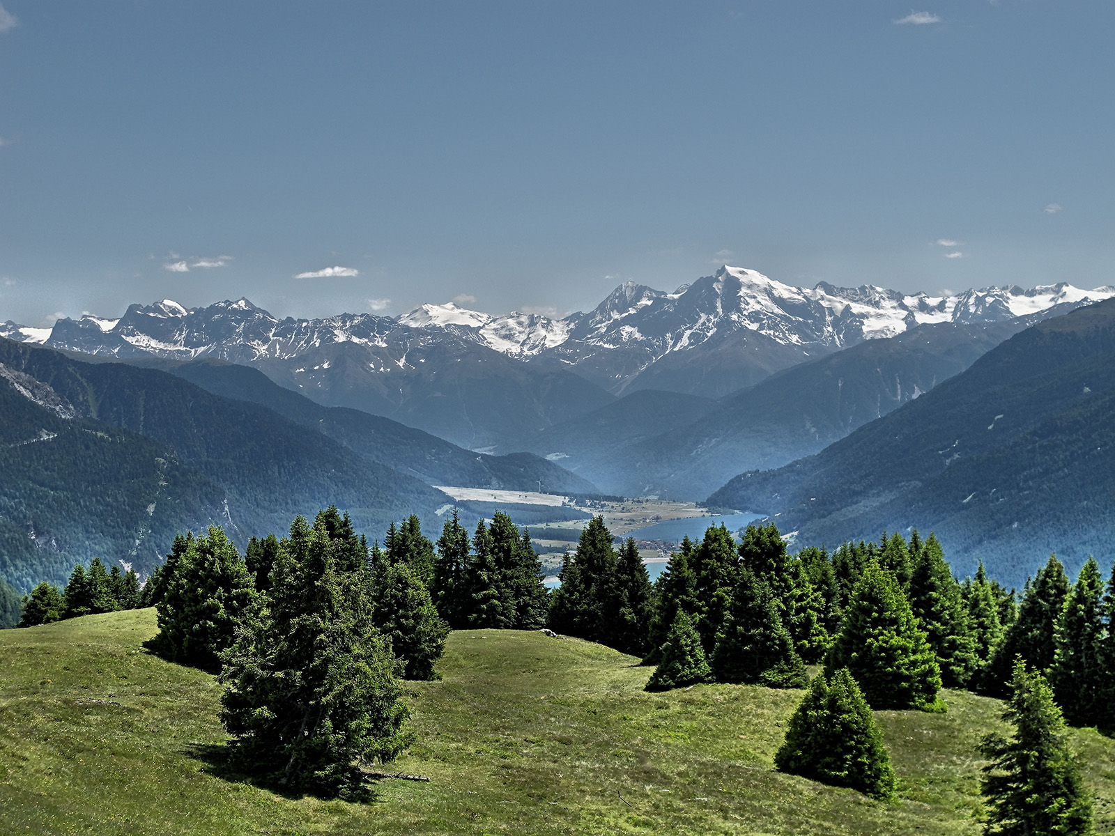 Alta Val Venosta da Pian dei Morti